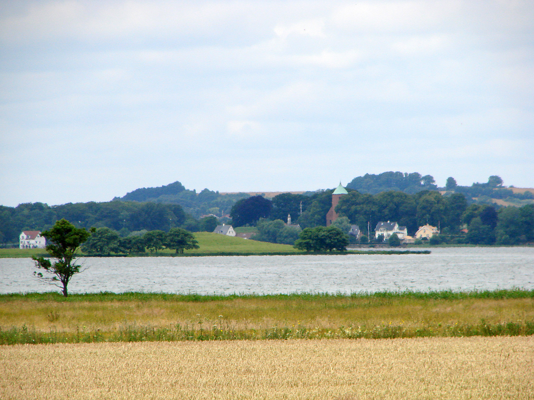 Skanderborg Sø seen from southeast, with Kalvø and Skanderborg Slotskirke.